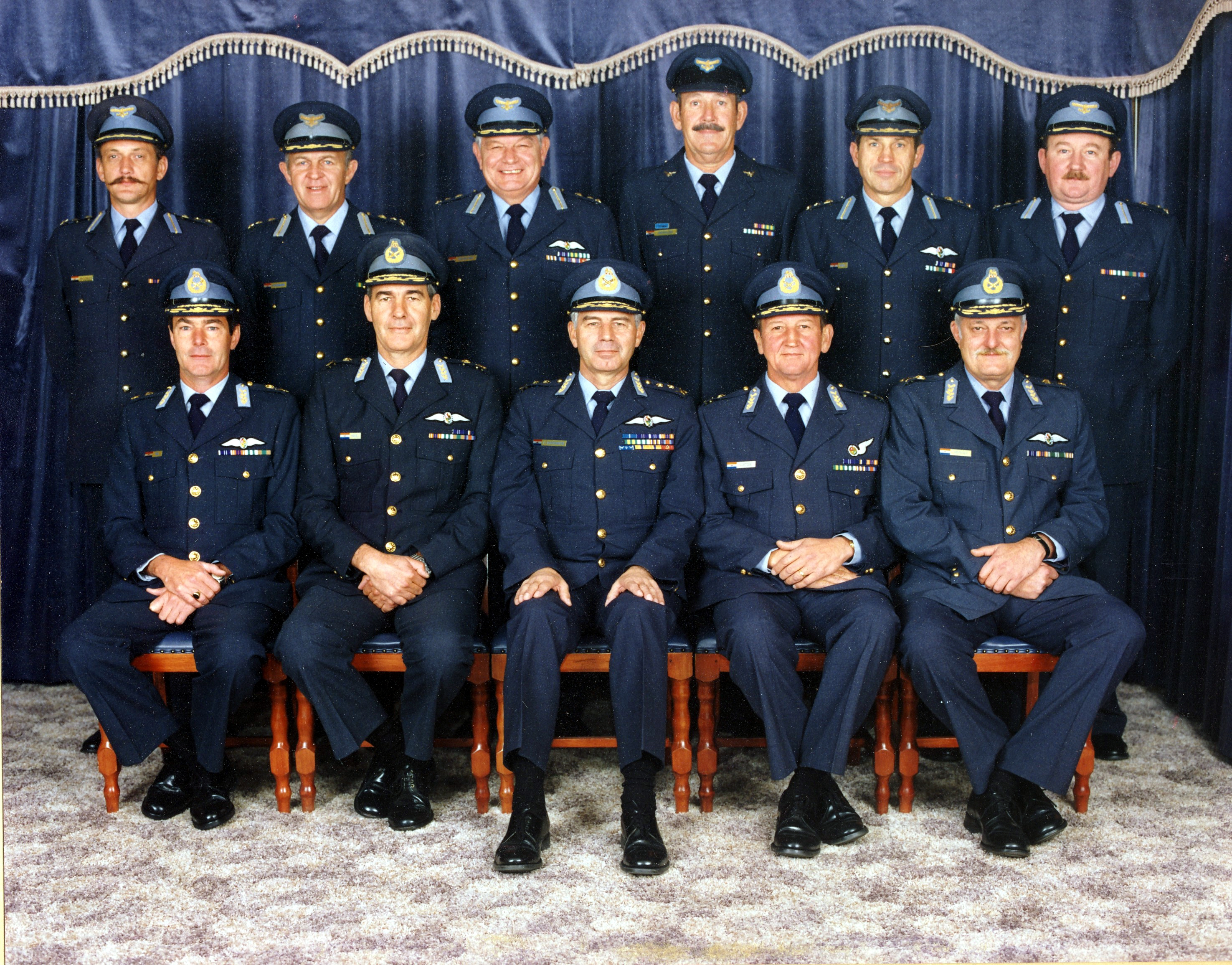 South African Air Force Command Council, June 1990 Front LTR Maj Gen G.C. Nel (CAS Log), Maj Gen James Kriel (CAFS), Lt Gen J.P.B. van Loggerenberg (CAF), Maj Gen G.J. Coetzee (IGAF), Maj Gen A.H. Repsold (CAS Ops) Back LTR Col A.H. Kritzinger (Secr), Brig T.P. Stegemann (CAS Pers), Brig J.W.O van den Berg (CAS Int), WO1 S.G. Oberholzer (SMAF), Brig Julius Kriel (CAS Plan), Brig C.L. Bröcker (CAS Fin)